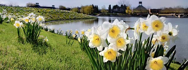 Regenstein center Chicago Botanic Garden Bird Island